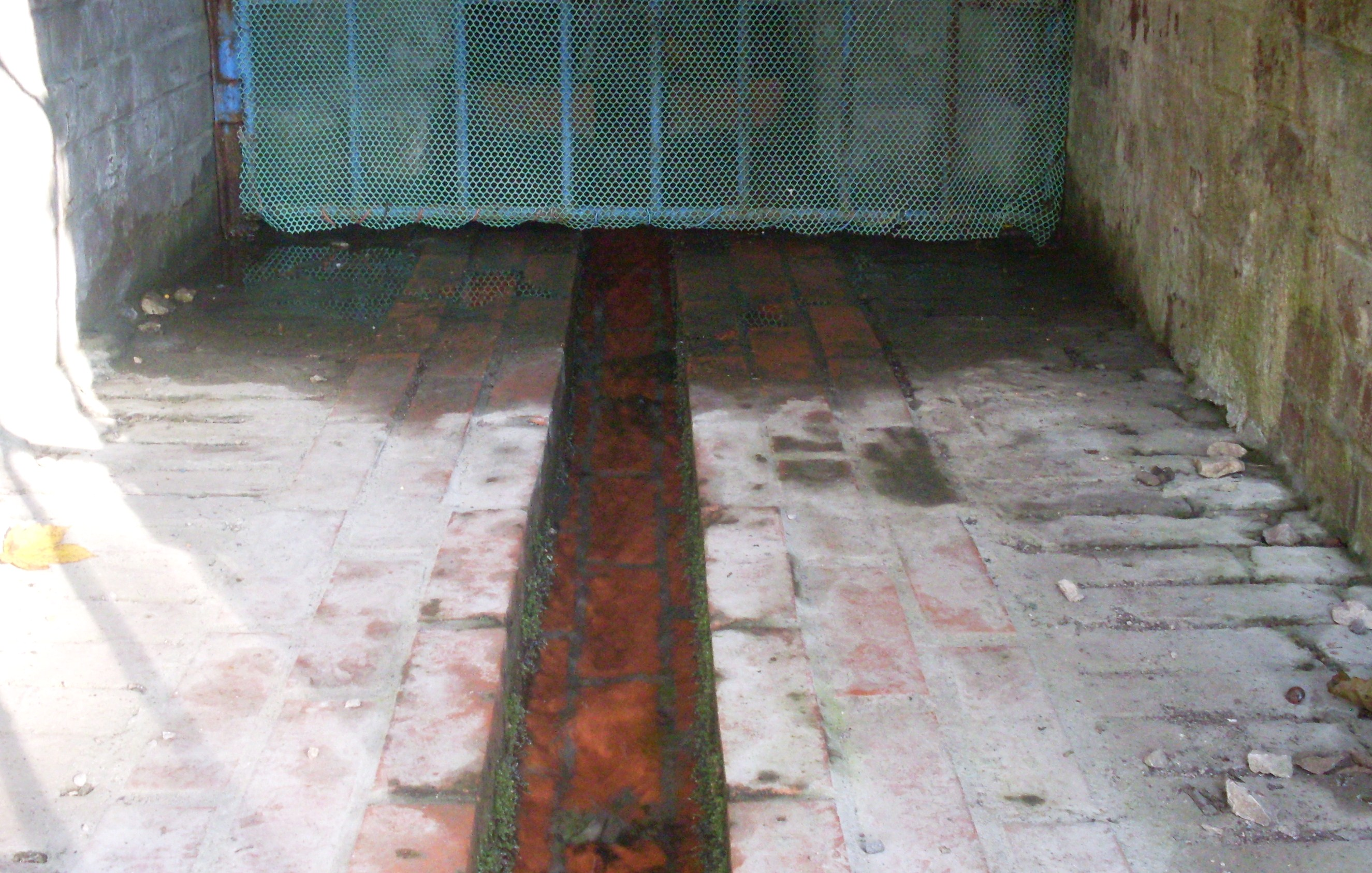 Źródło Nowe Krzeszowice-Czatkowice